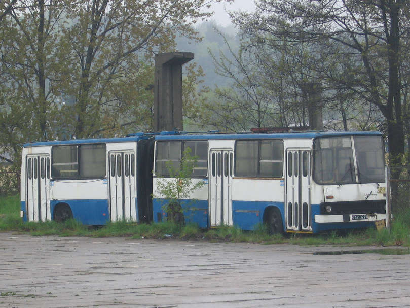 Ikarus 280E (#3689) z 1983 roku w Gdyni. Z autobusu przerobiony na trolejbus PNTKM/Ikarus 280.26E.